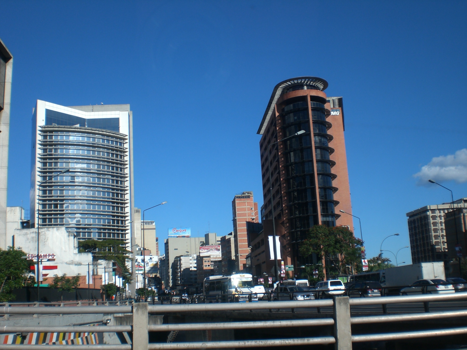 Municipio Chacao, Estado Miranda